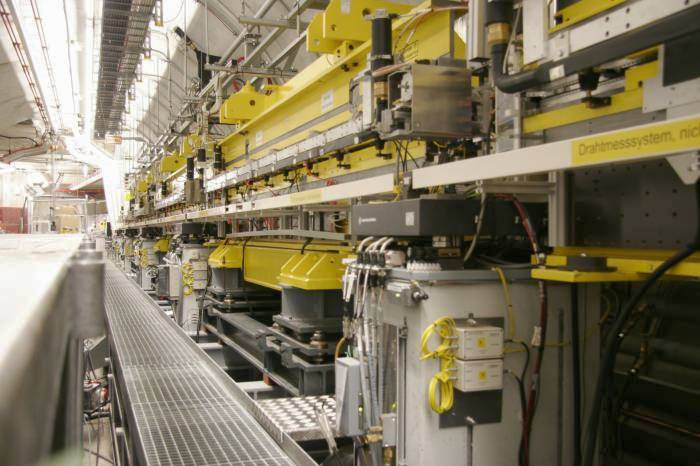 Teilchenquelle vom Freie Elektronen Laser FLASH am DESY in Hamburg; Nahaufnahme der Undulatoren; sichtbar sind ca. 20m. Veröffentlichung mit freundlicher Genehmigung DESY, Hamburg.